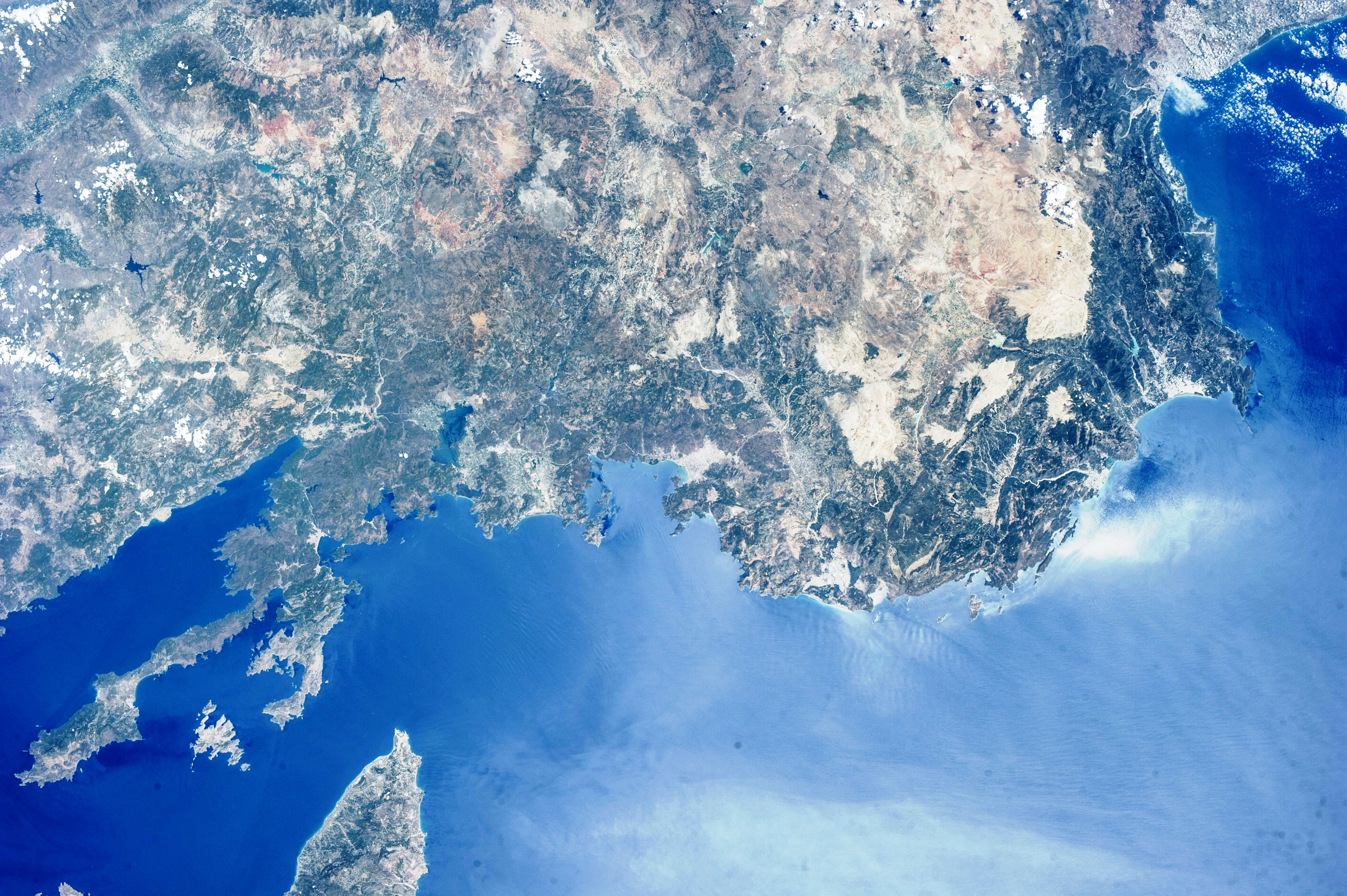 ISS uluslararası uzay istasyonundan, 2013.06.28 tarihinde 407 km yüksekten çekilmiş fotoğraf. Teke yarımadası, Antalya'nın doğusu, Muğla'nın güneyi, Köyceğiz gölü, Datça yarımadası, Marmaris, Gökova körfezi, görülmektedir.